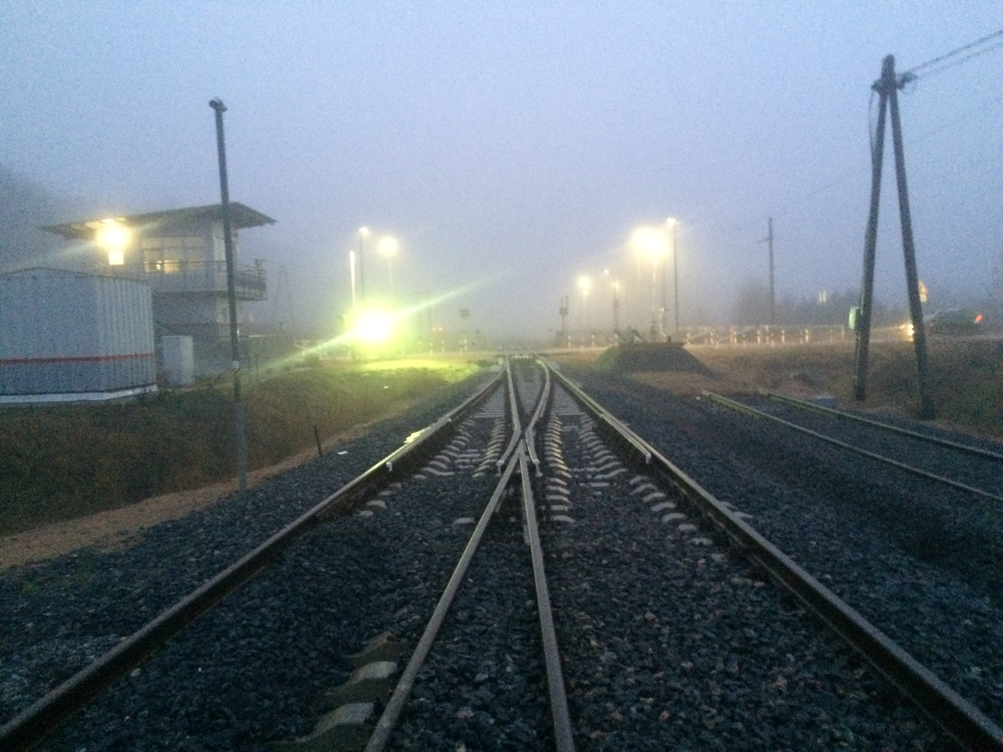 Ермилово